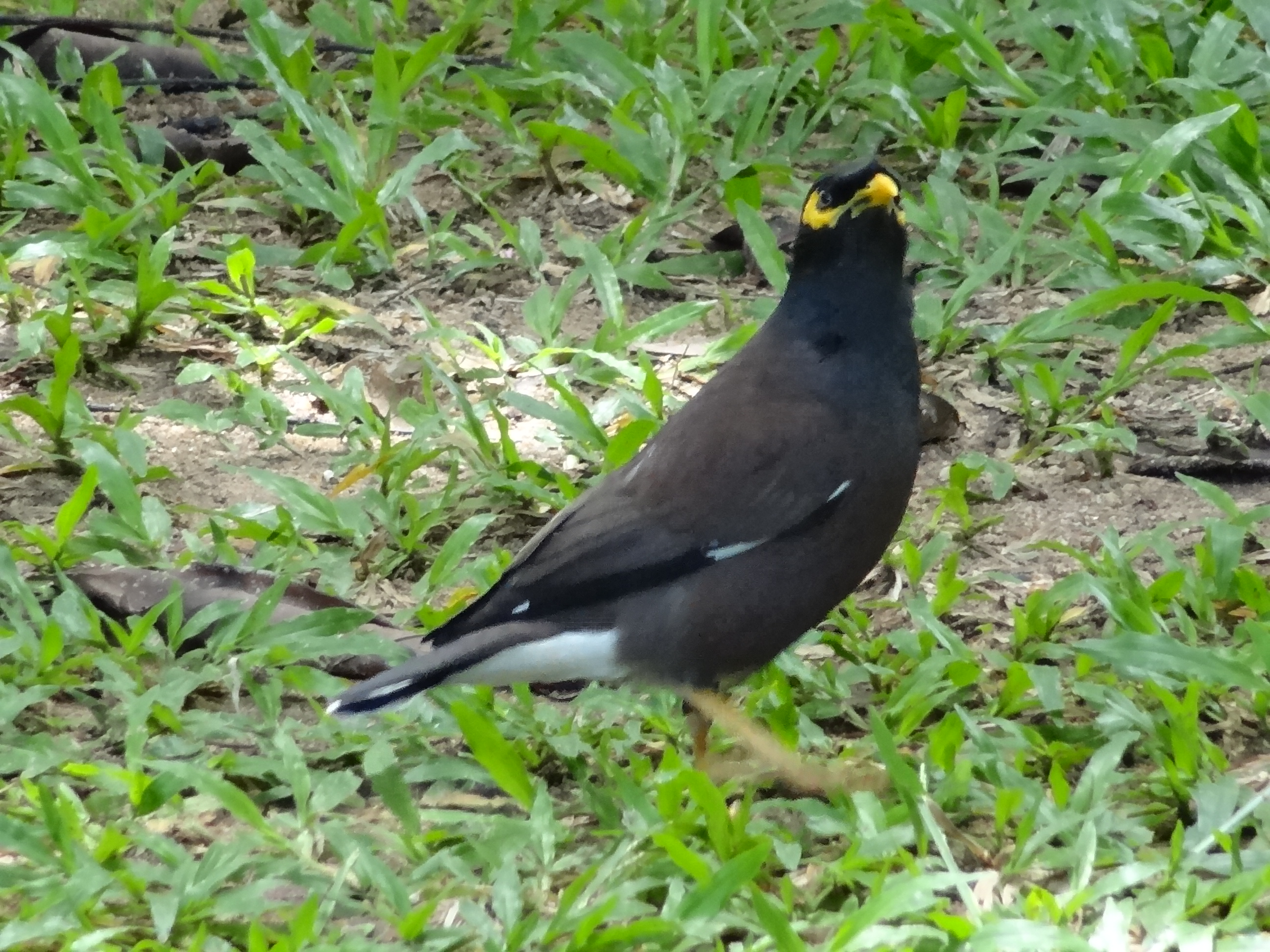 Acridotheres tristis